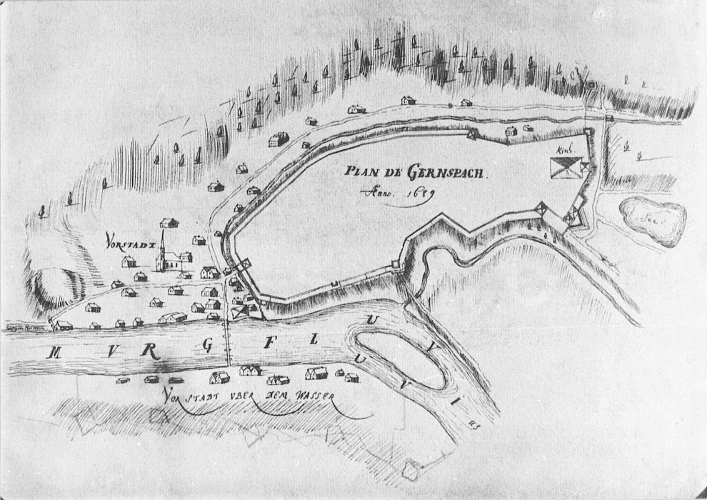 Lage der Gernsbacher Stadtmauer und Vorstädte. Zeichnung aus Samson Schmalkalders Skizzenbuch aus dem Jahr 1689. Norden ist rechts unten.